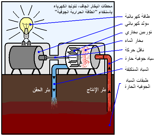 محطات "البخار الجاف" لتوليد الكهرباء باستخدام الطاقة الحرارية الأرضية dry steam power plant